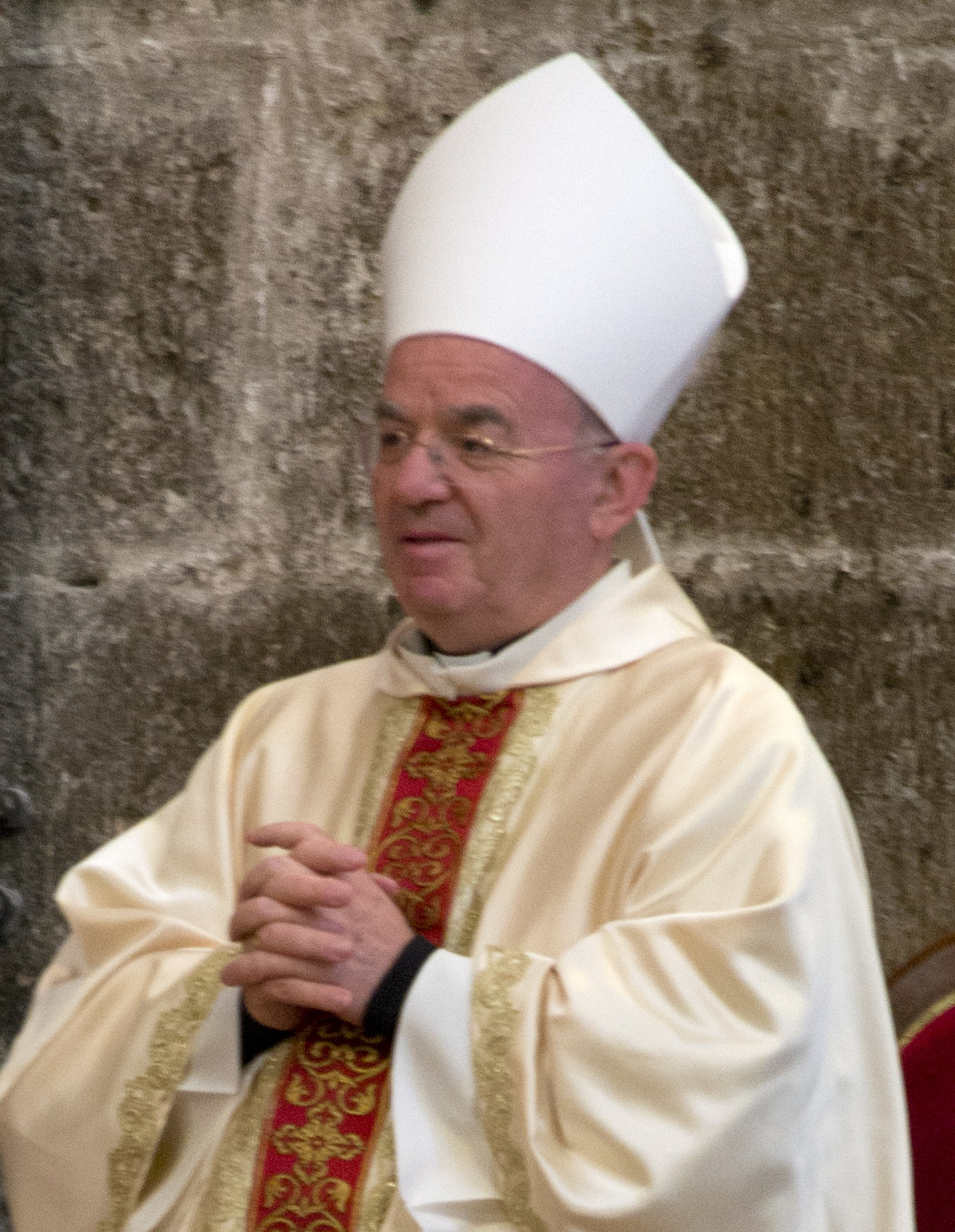 Nuncio apostóico del Papa en España, D. Renzo Fratini